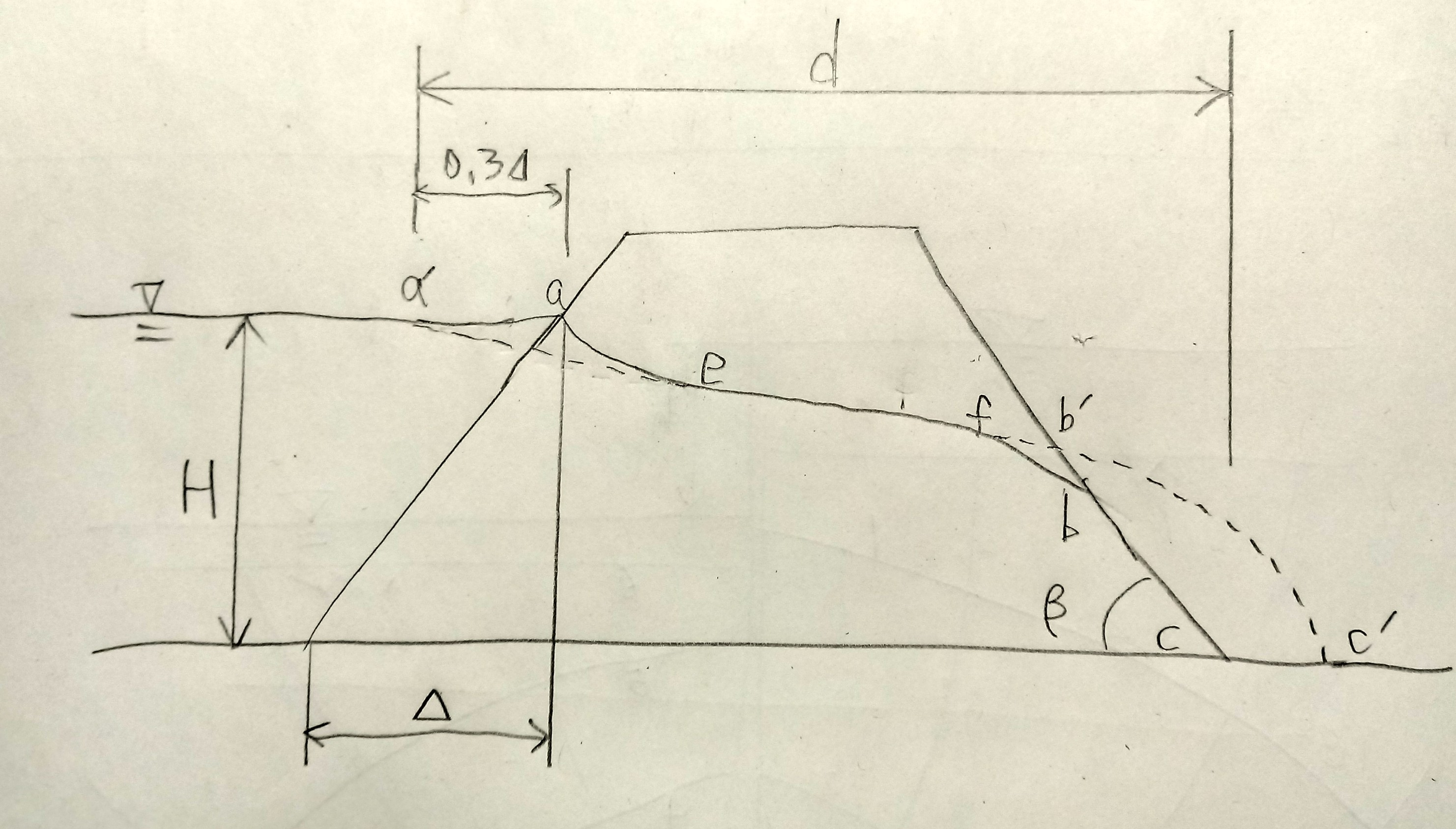 흙댐의 침윤선3